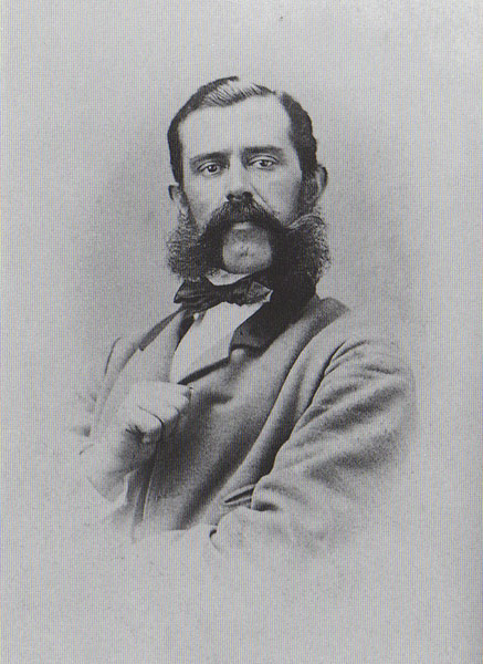 фотографија. око 1865. Феликс Каниц, археолог и путописац (1829-1904). F. W. Rösler, Wien.